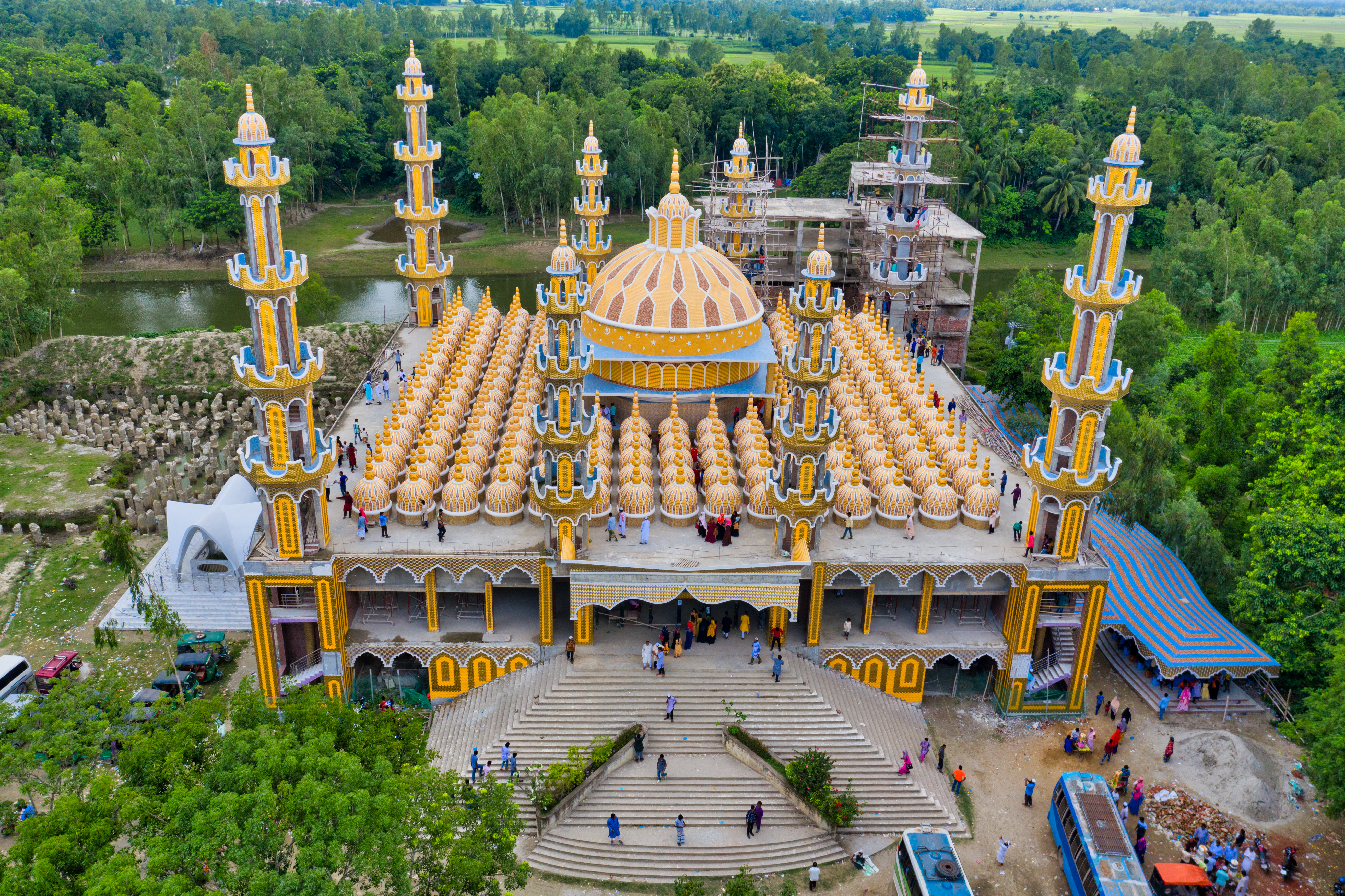 ২০১ গম্বুজ মসজিদ